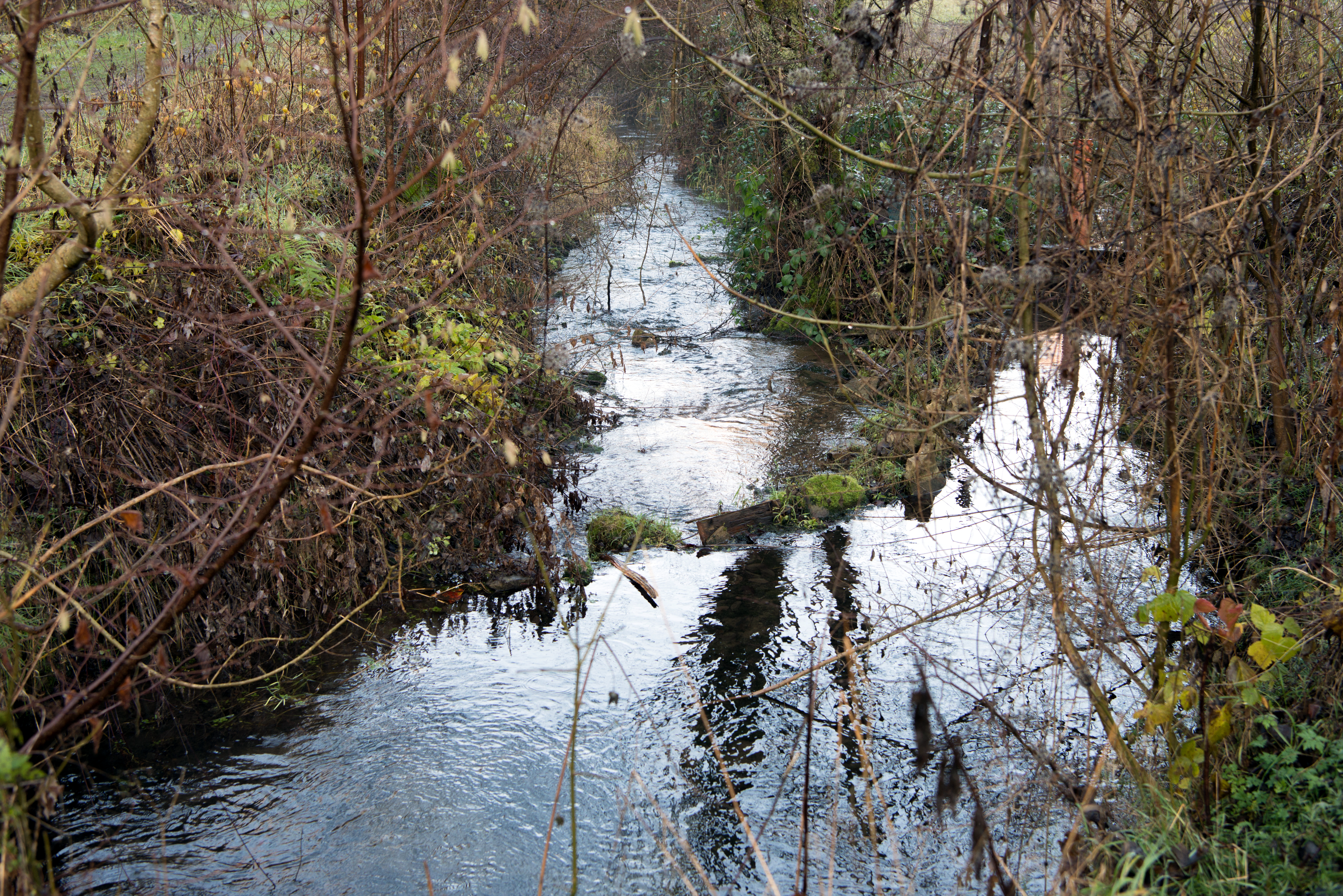 D'Réierbaach zu Zowaasch.